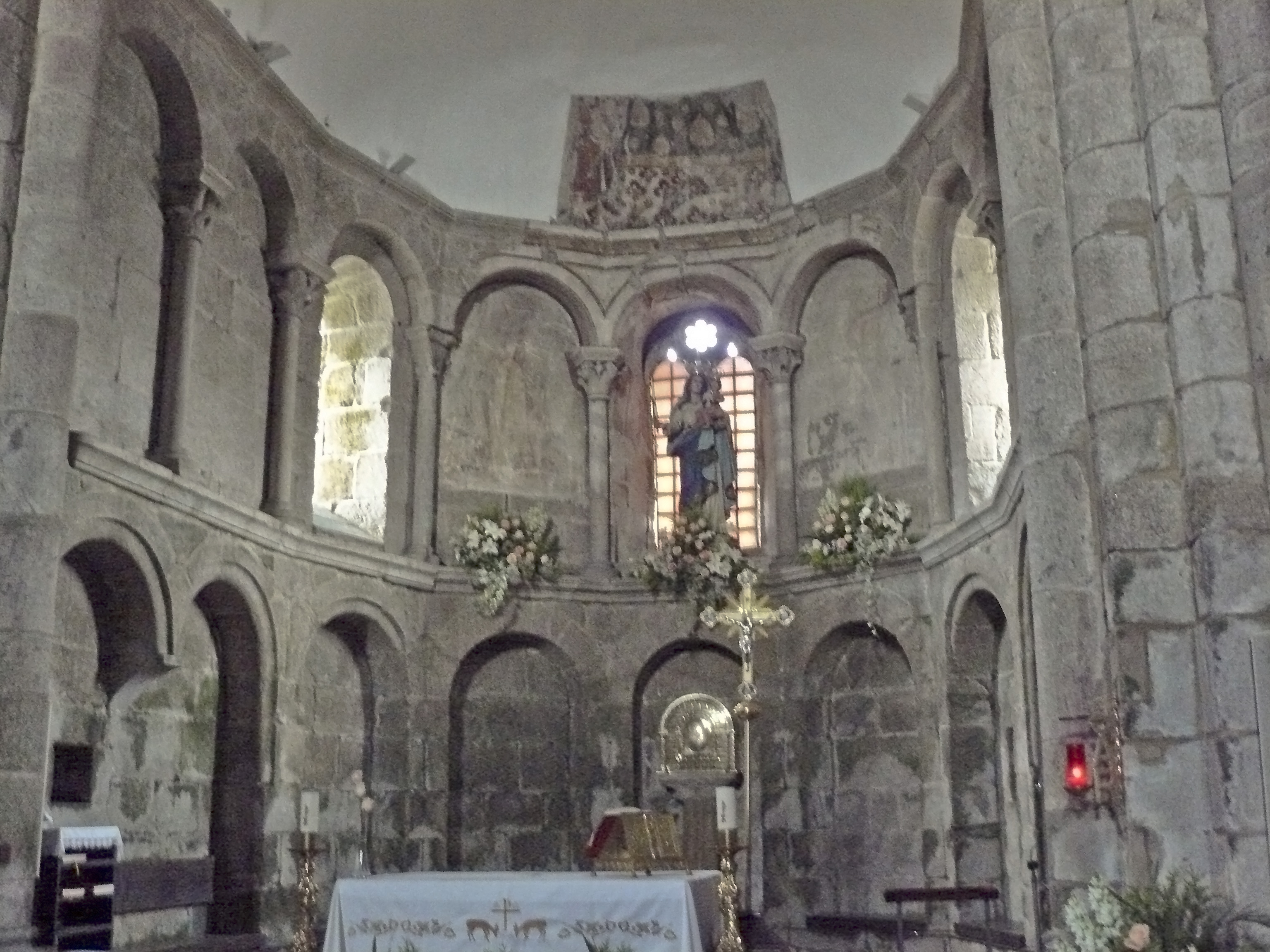 Ábsida maior da Colexiata de Sar